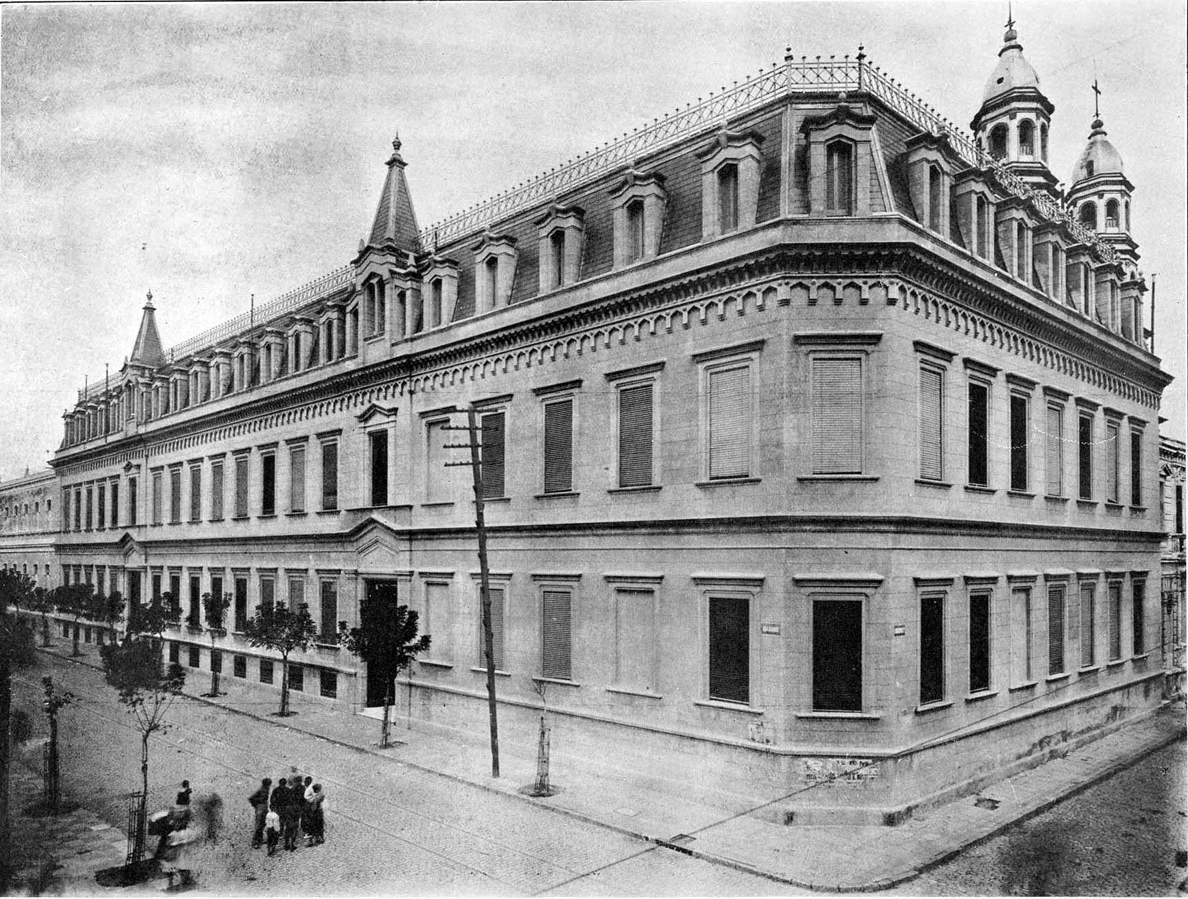 Vista del Instituto Manuel A. Aguirre, en la calle Balcarce n° 1181, parte del Patronato de la Infancia, que tenía en esa cuadra su complejo de edificios. El edificio fue demolido en la década de 1980 y hoy se encuentra allí una cancha de fútbol. Atrás se ven las cúpulas de la Iglesia de San Pedro Telmo.